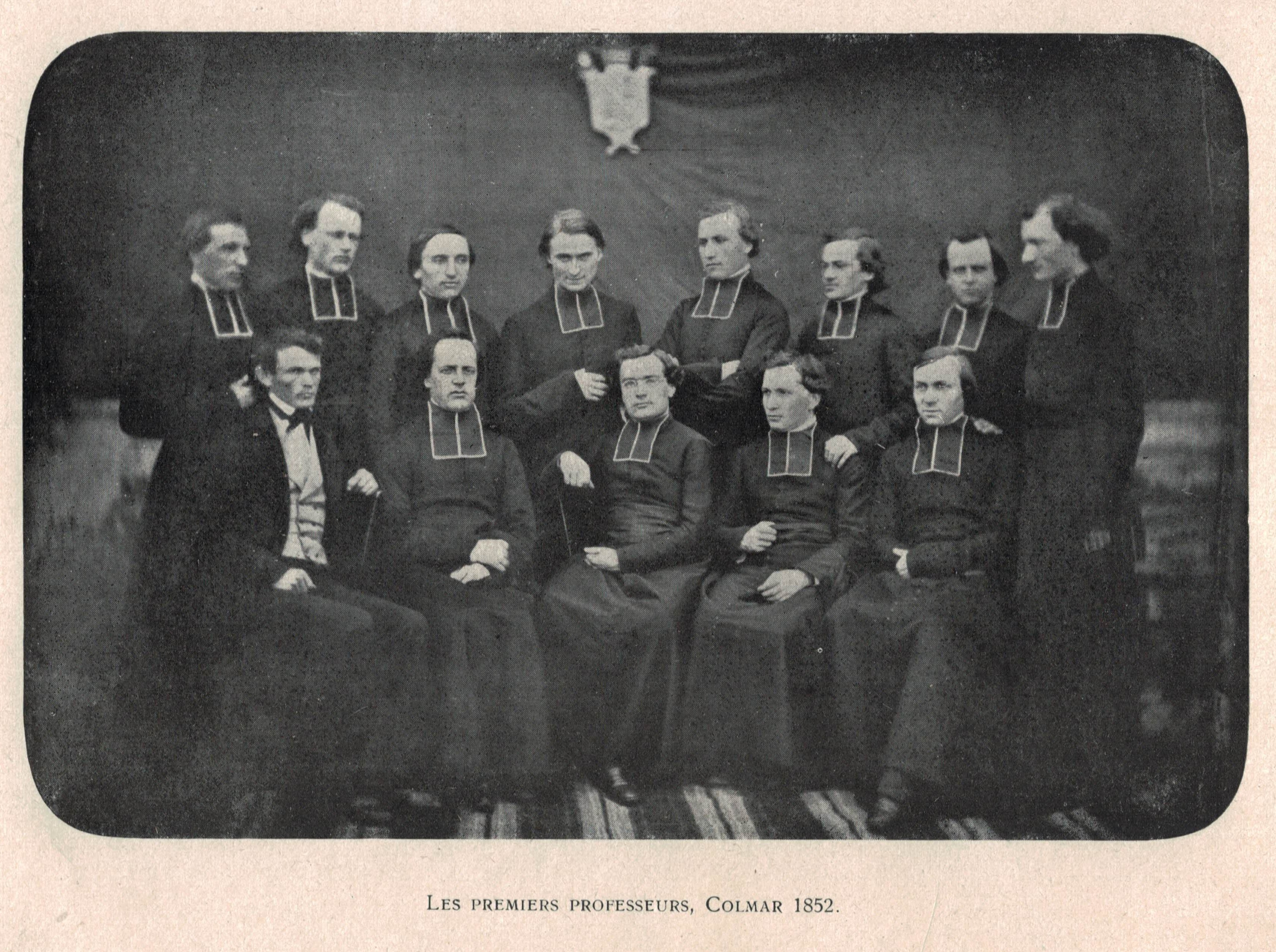 Elèves du collège libre - les premiers professeurs en 1852 (édition de 1908)